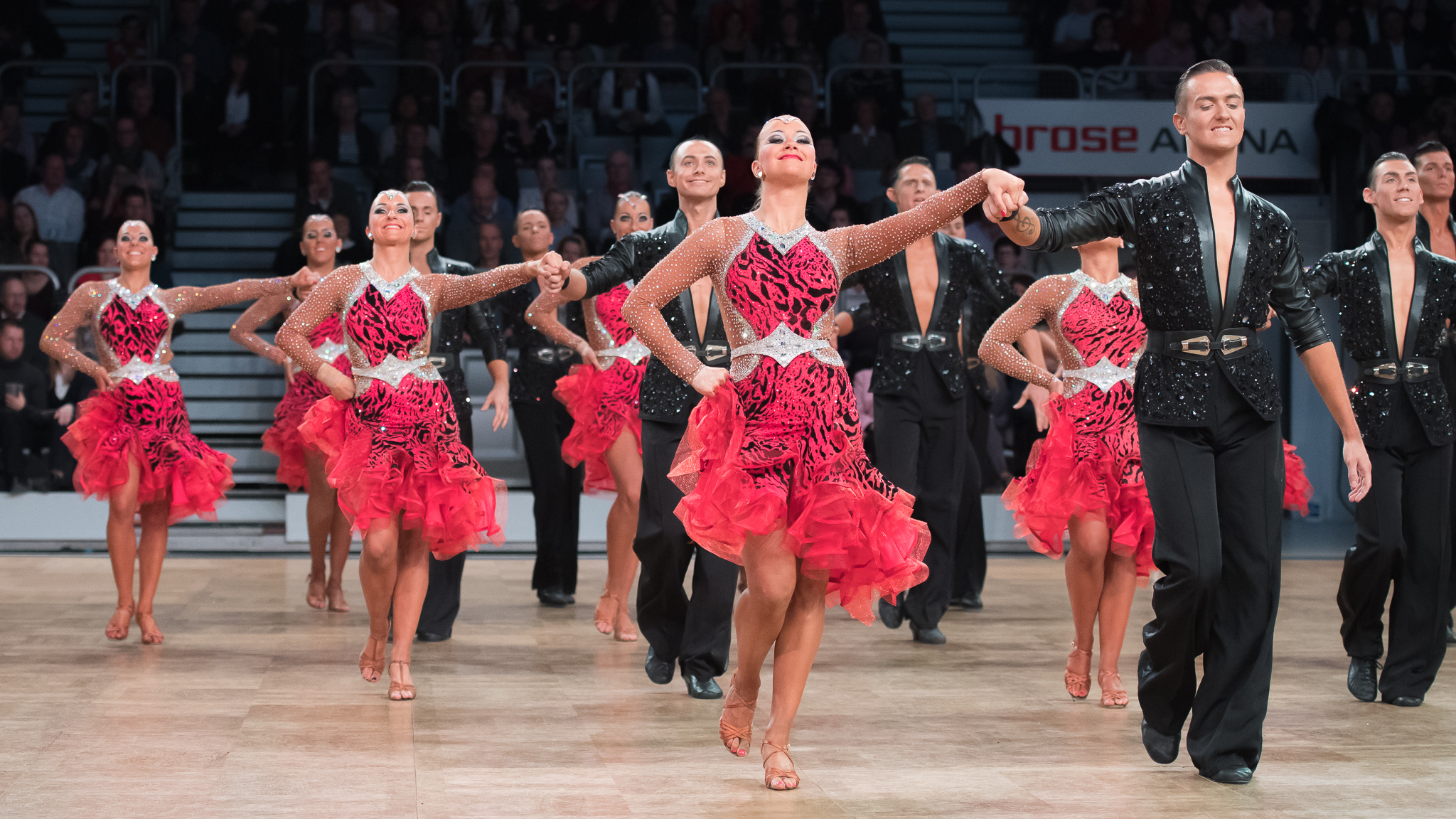 Brose Arena Bamberg,Deutsche Meisterschaften der Formationen Standard & Latein 2016,Grün-Gold-Club Bremen B,Latein,Rocky,Tanzsport